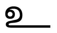 уна тамильская